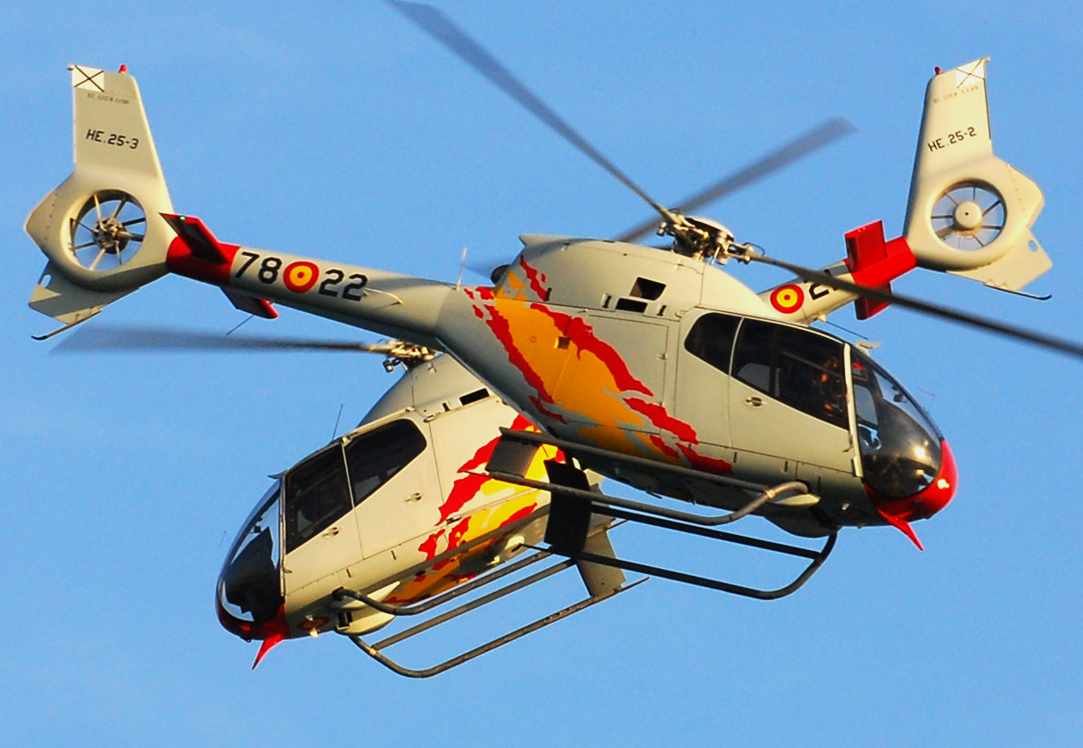 Eurocopter EC 120. Patrulla ASPA Barcelona, 4-octubre-2009